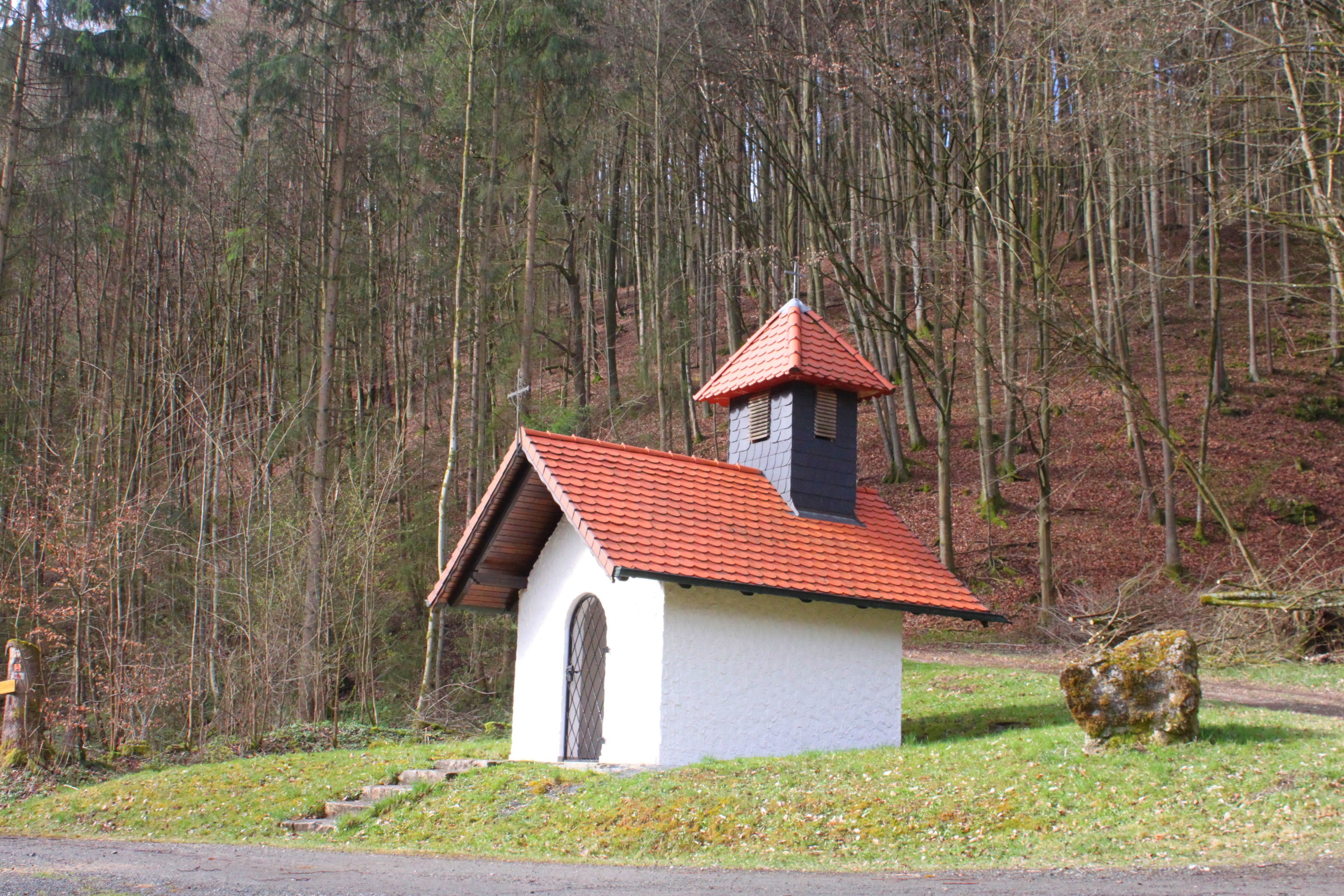 Wegkapelle bei der Herbstmühle, einem Ortsteil von Weismain im Bärental, wurde 1982 errichtet